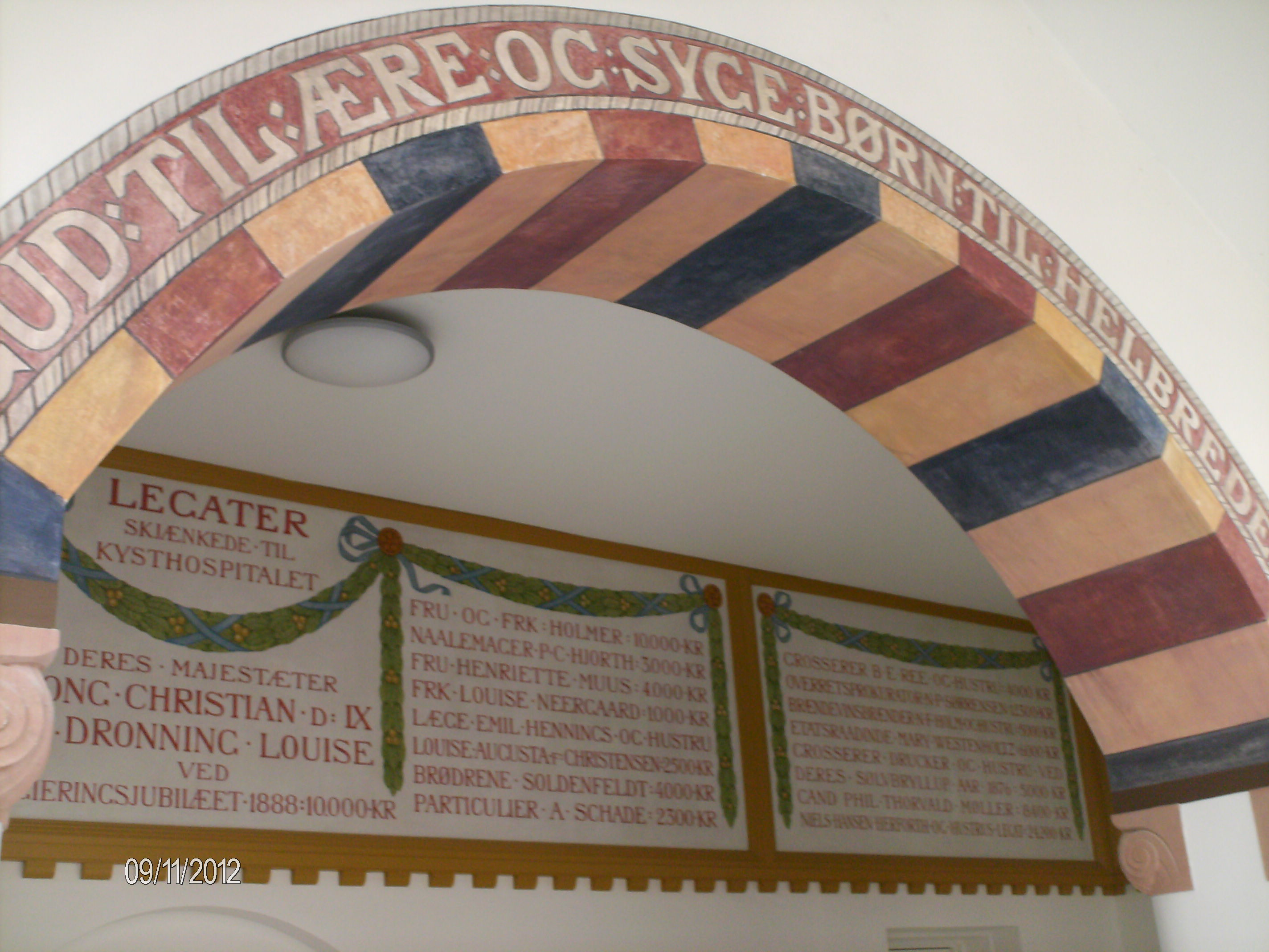 Inskrepton med "Gud til ære og børn til helbredelse" - samt liste over donationer.